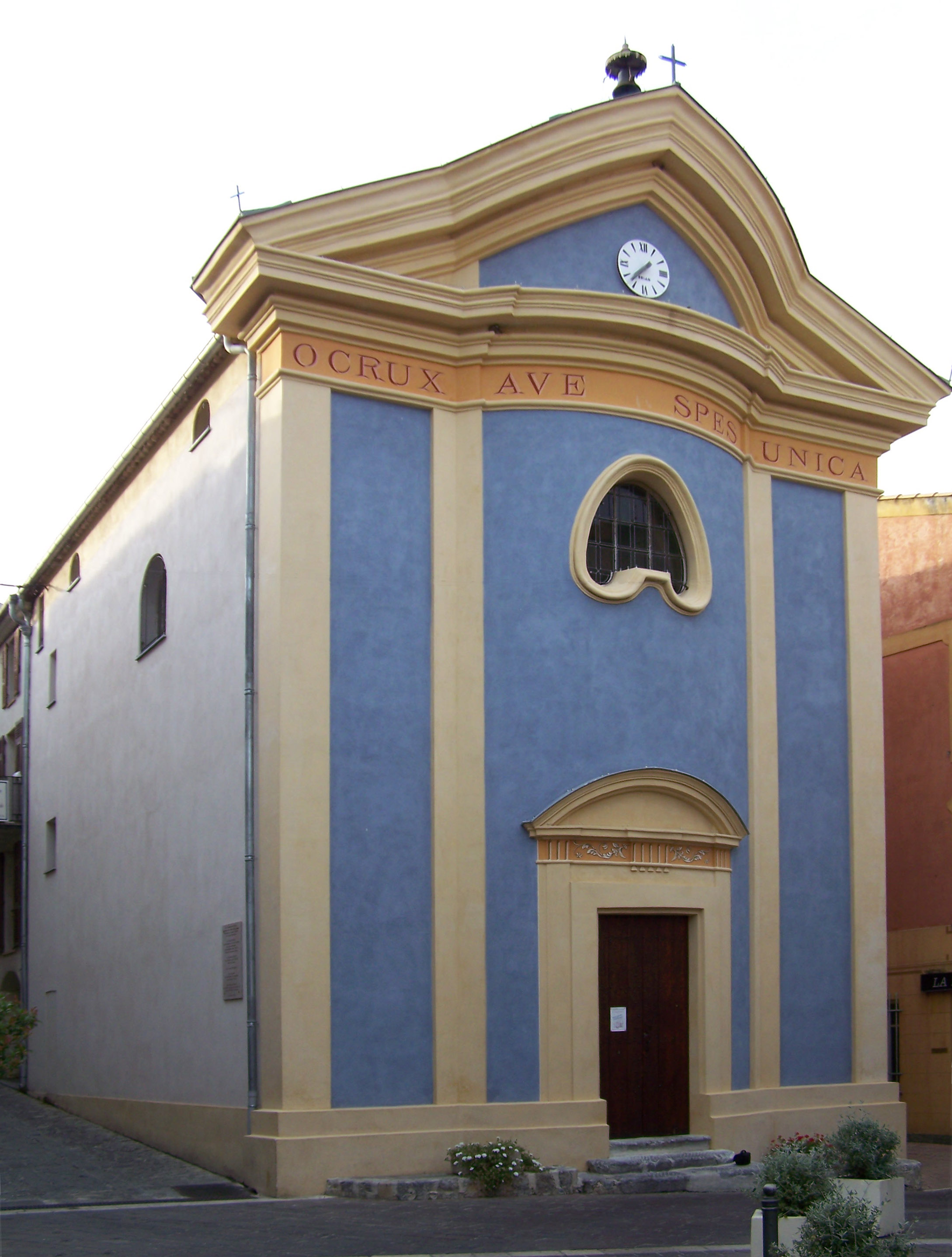 Chapelle de la confrérie des pénitents blancs (18° siècle) dans le village de Levens (Alpes-Maritimes, France). La phrase en latin inscrite au fronton de la chapelle signifie : "O croix, salut... unique espoir"